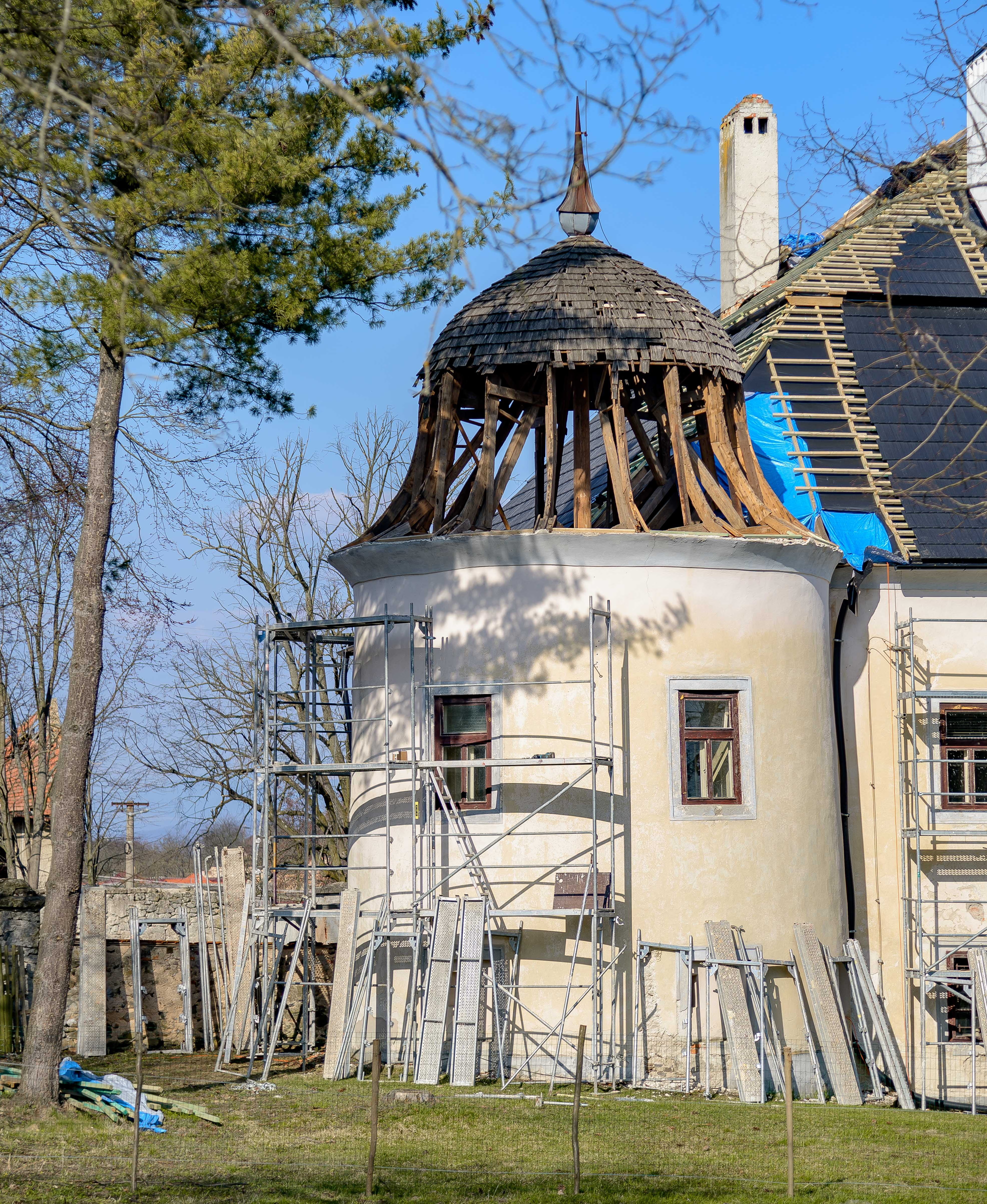 Rekonštrukcia kaštieľa v Ostrej Lúke na jar 2020.